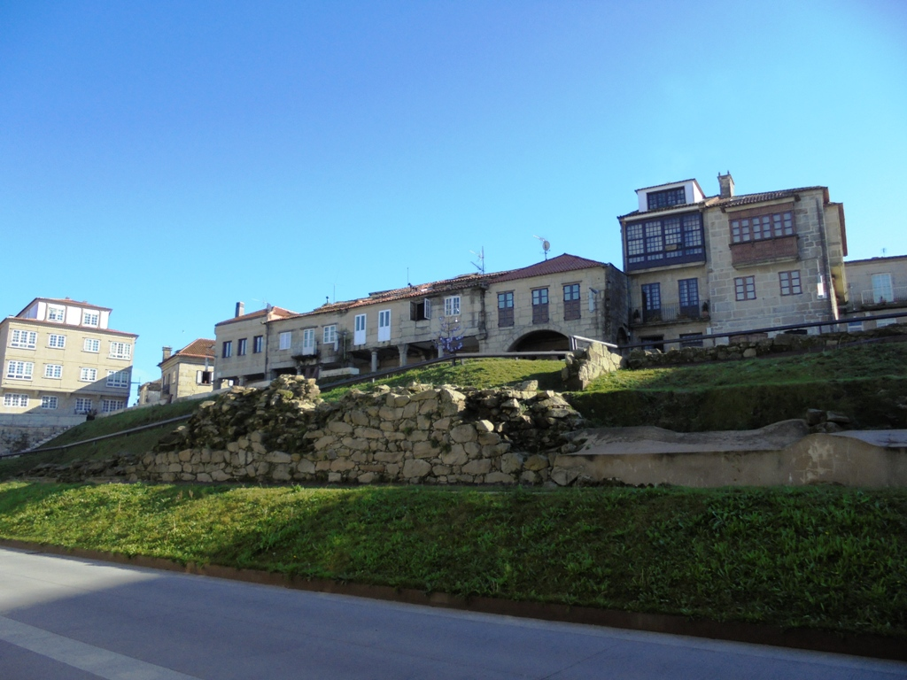 Vestigios de la muralla de Pontevedra capital